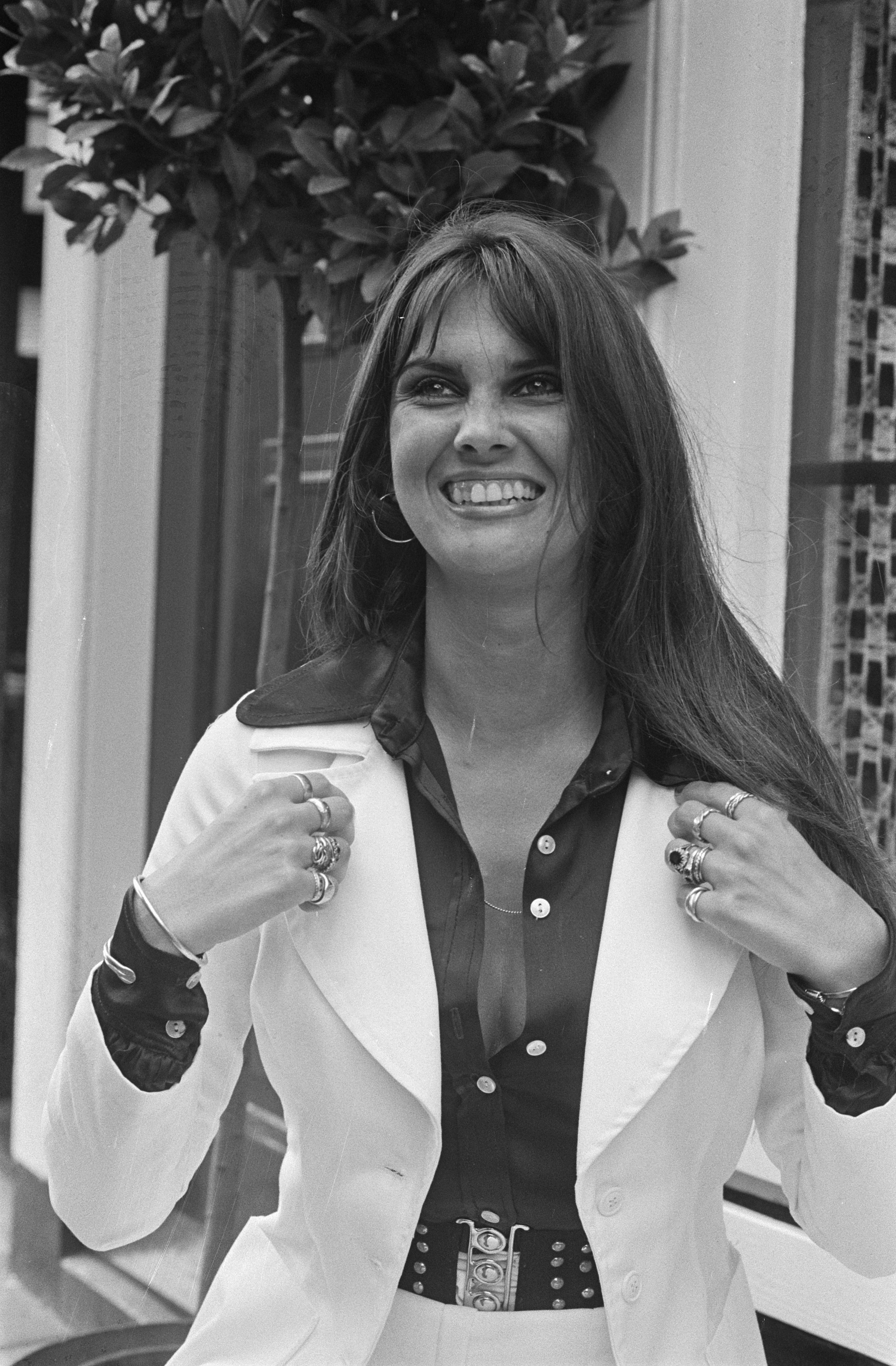 Collectie / Archief : Fotocollectie Anefo Reportage / Serie : [ onbekend ] Beschrijving : Actrice Caroline Munro in Amsterdam n.a.v. premiere van de film "The Golden Voyage of Sinbad" Datum : 30 juli 1974 Locatie : Amsterdam, Noord-Holland Trefwoorden : actrices, filmsterren, portretten Persoonsnaam : Munro, Caroline Fotograaf : Peters, Hans / Anefo Auteursrechthebbende : Nationaal Archief Materiaalsoort : Negatief (zwart/wit) Nummer archiefinventaris : bekijk toegang 2.24.01.05 Bestanddeelnummer : 927-3583